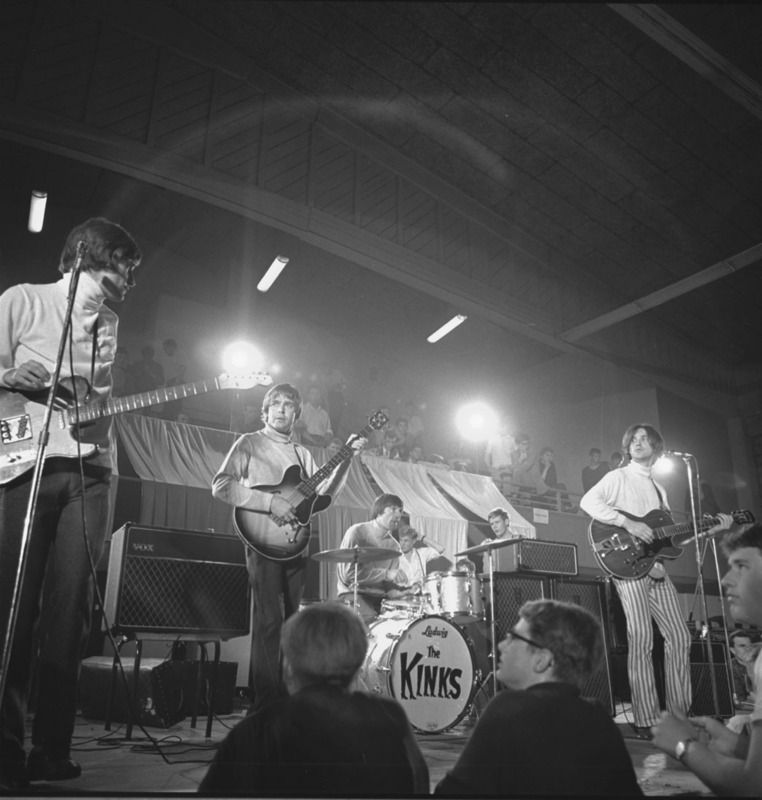 The Kinks i Nordstrandhallen, våren 1966